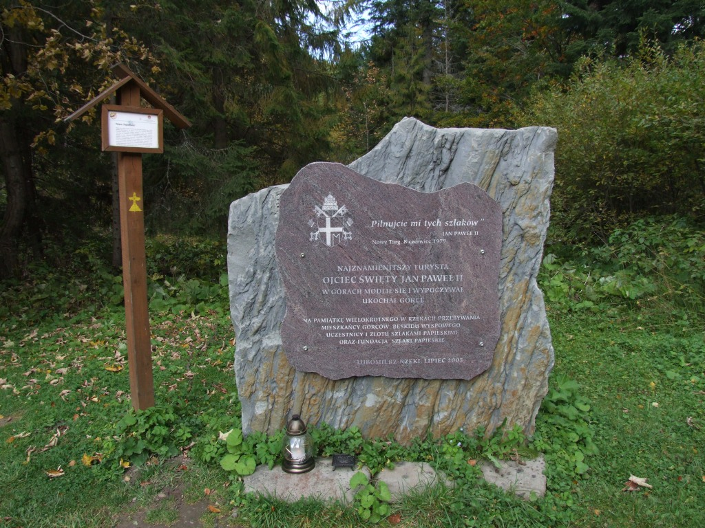 Pamiątkowy głaz z tablicą na polanie Papieżówka w Gorcach